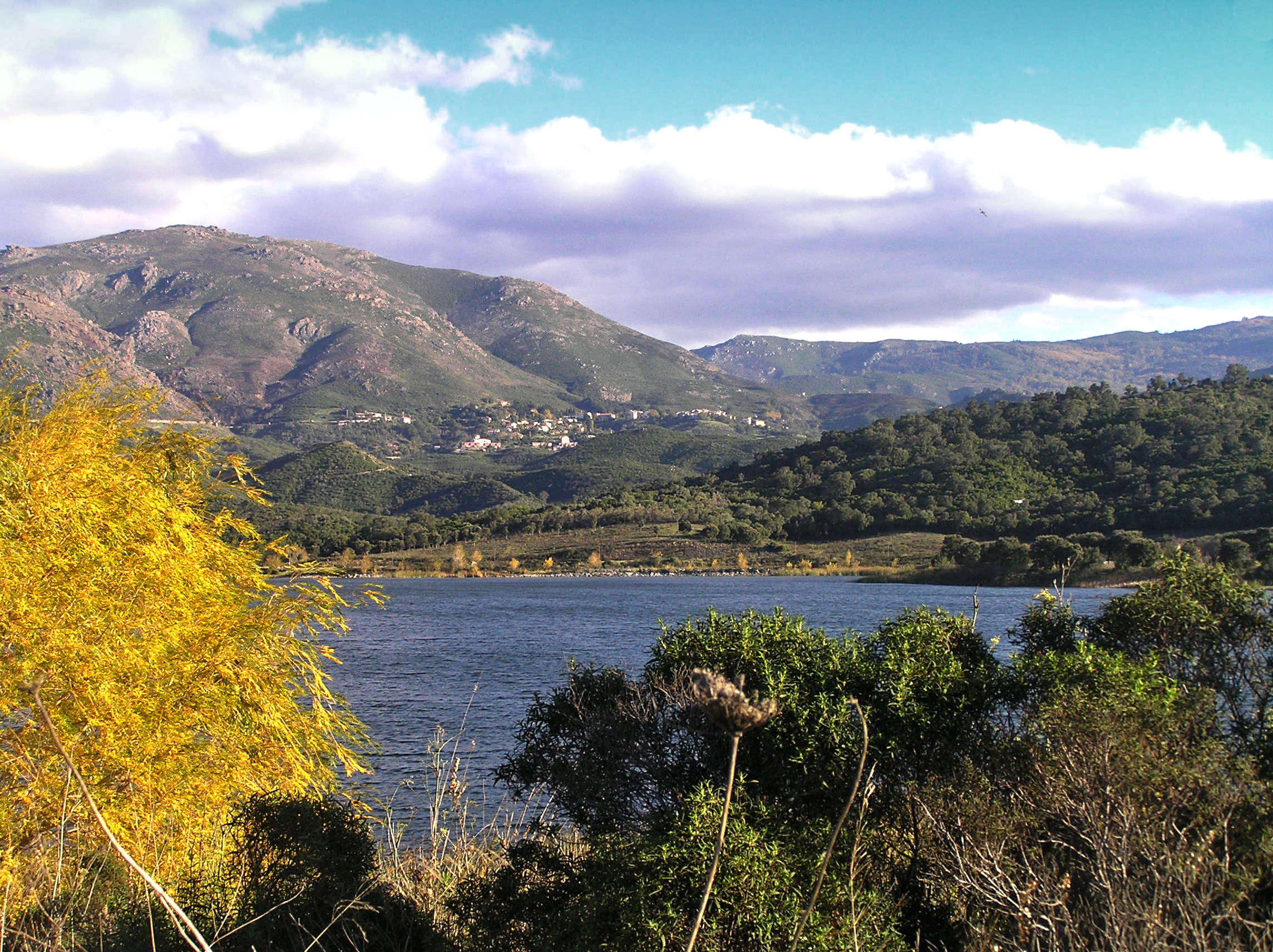 Oletta (Corse) - Lac de Padula. Au fond, le village d'Olmeta-di-Tuda